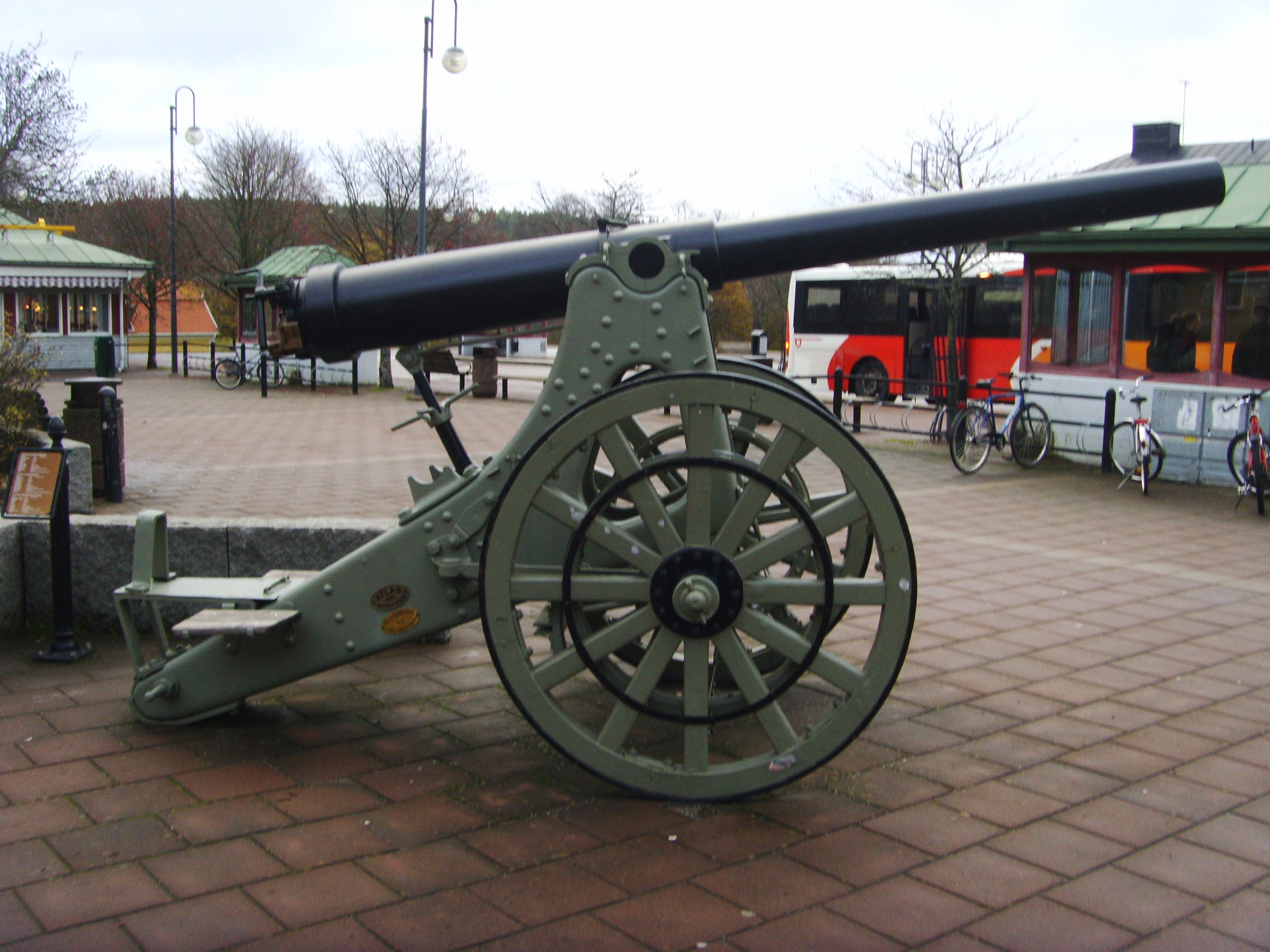 Befästnings- och positionsartilleripjäs på Bergslagstorget i centrala Finspång. Kaliber 12 cm. Räfflad pipa. Stridsladdning 3,5 kg. Granater 16,2 kg. Skottvidd 8600 m. Rekyl 3,5 m. Bemanning 6 man. Förflyttning med 6 hästar. Konstruktion Krupp-Tyskland. Material bestående av stålgöt från Bofors-Gullspång. Tillverkningsort Finspång.